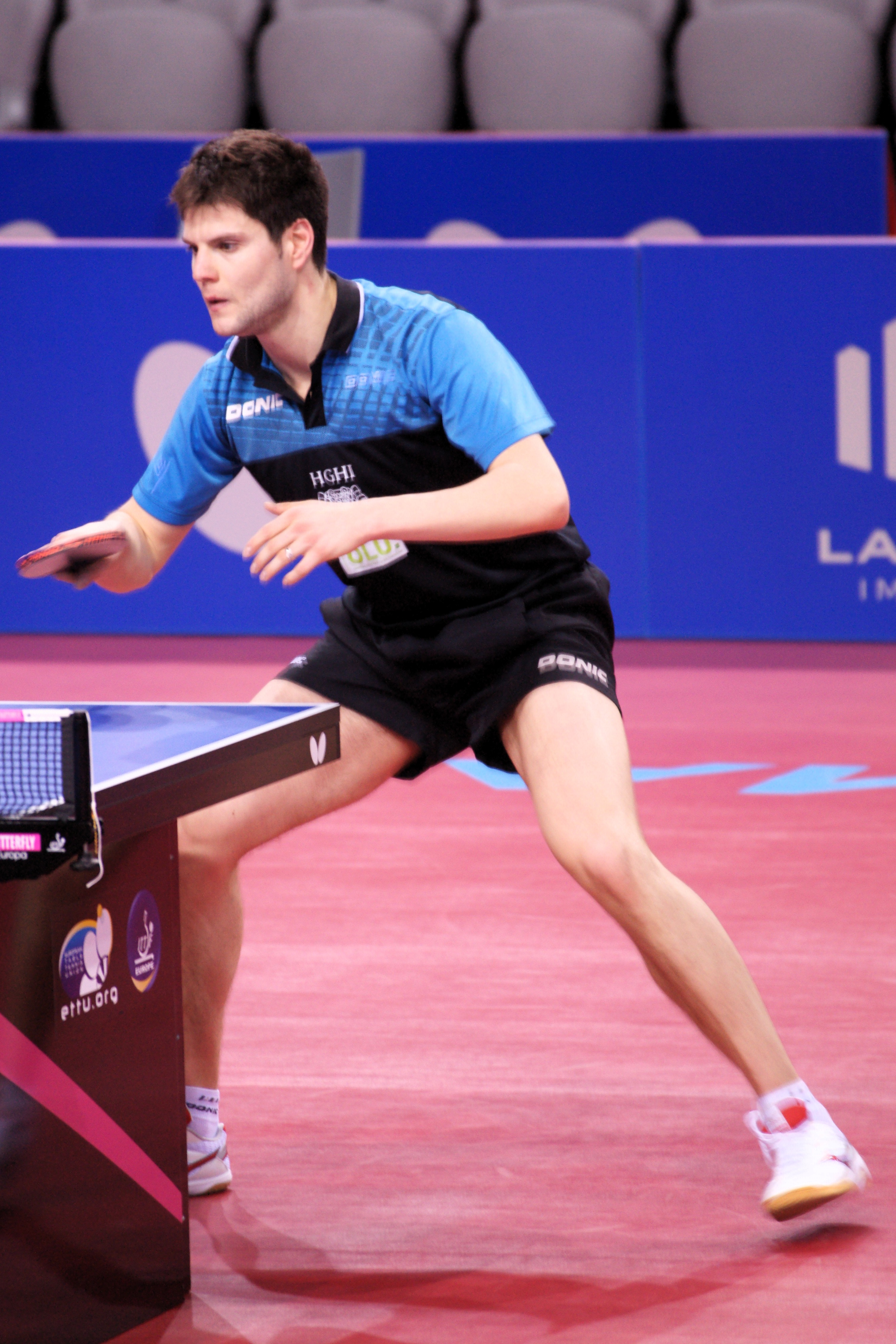 Dimitrij Ovtcharov, Top 16 Antibes 2017